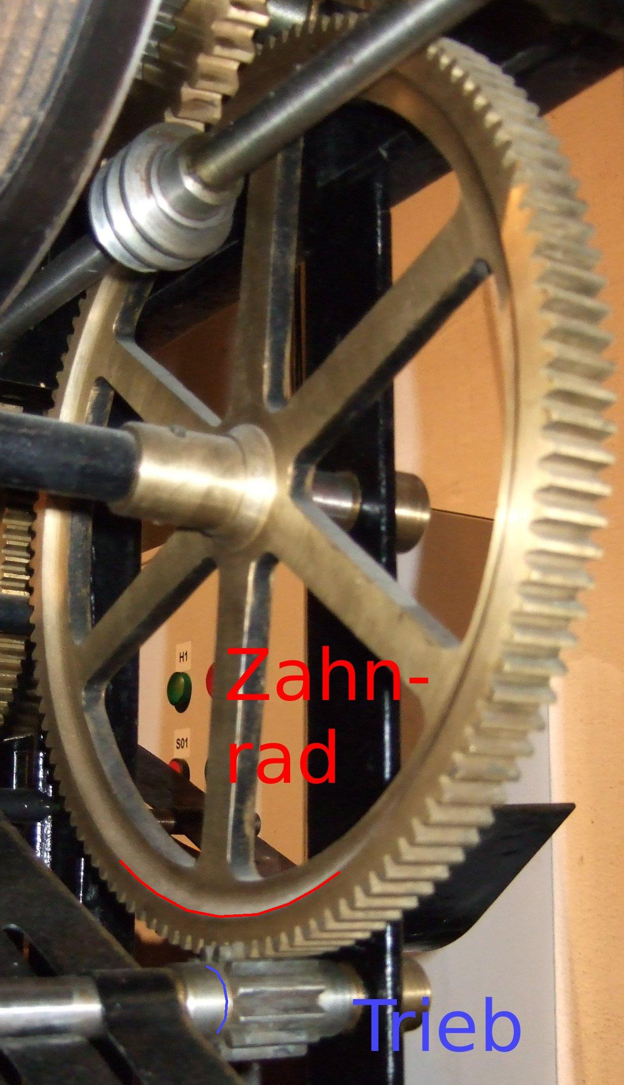 Zahnrad und Trieb. Das Uhrwerk ist im Museum Indrustriekultur Nürnberg ausgestellt. Genehmigung zum Fotografieren und Veröffentlichen in Wikipedia unter GNU-Lizenz / Creative Commons gemäß feundlicher Genehmigung in den e-Mails 14.07.2008 10:32 und 25.07.2008 14:33.